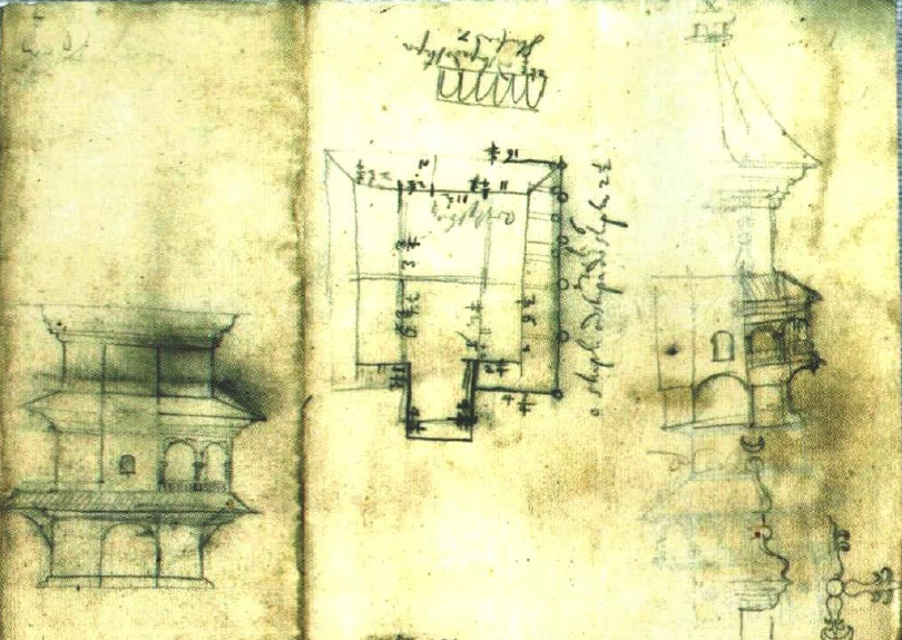 Беларуская (тарашкевіца): Слуцак (Słucak), вуліца Спаская (vulica Spaskaja). Брама Спаскага манастыра